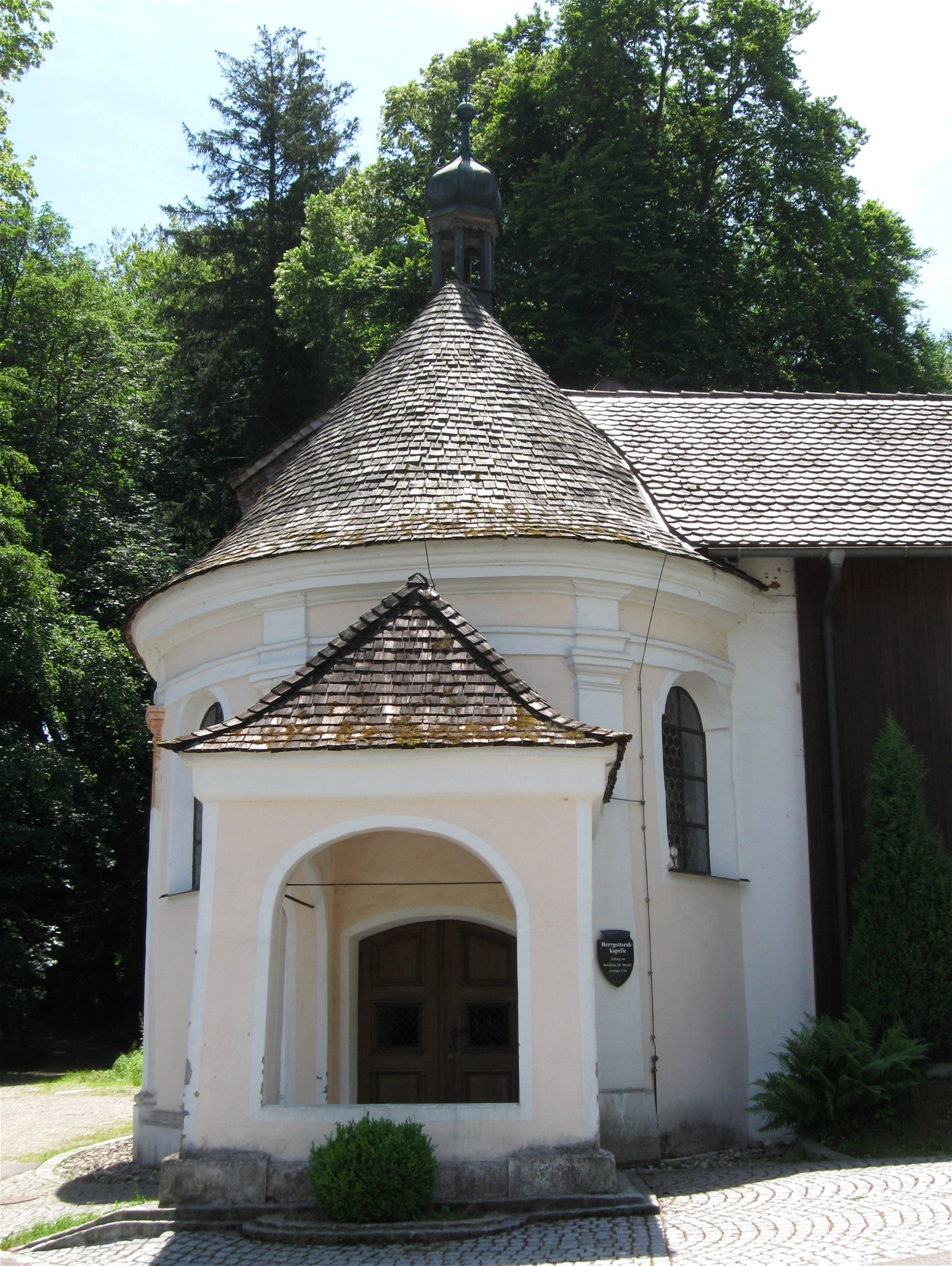 Memminger Straße 39; Katholische Herrgottsruhkapelle, pilastergegliederter Zentralbau über längsovalem Grundriss mit Dachreiter und nördlichem Vorbau, 1718; mit Ausstattung; Lindenallee, 1723. D-7-78-173-114